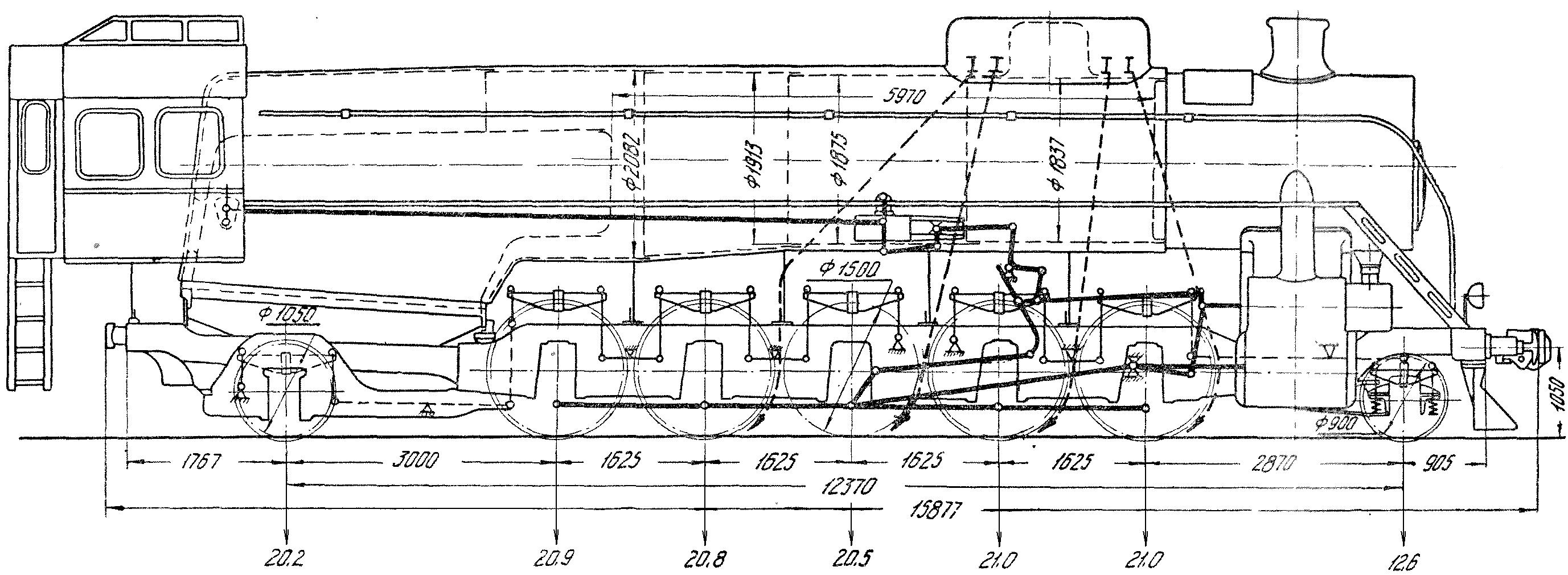 Основные размеры паровоза ФД20